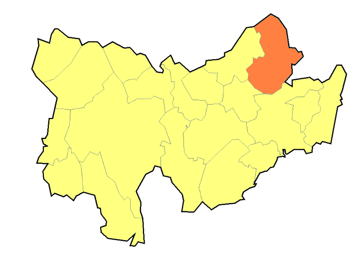 Hranice Nemochovice (Vyškov-(Bučovice)- czech republic)